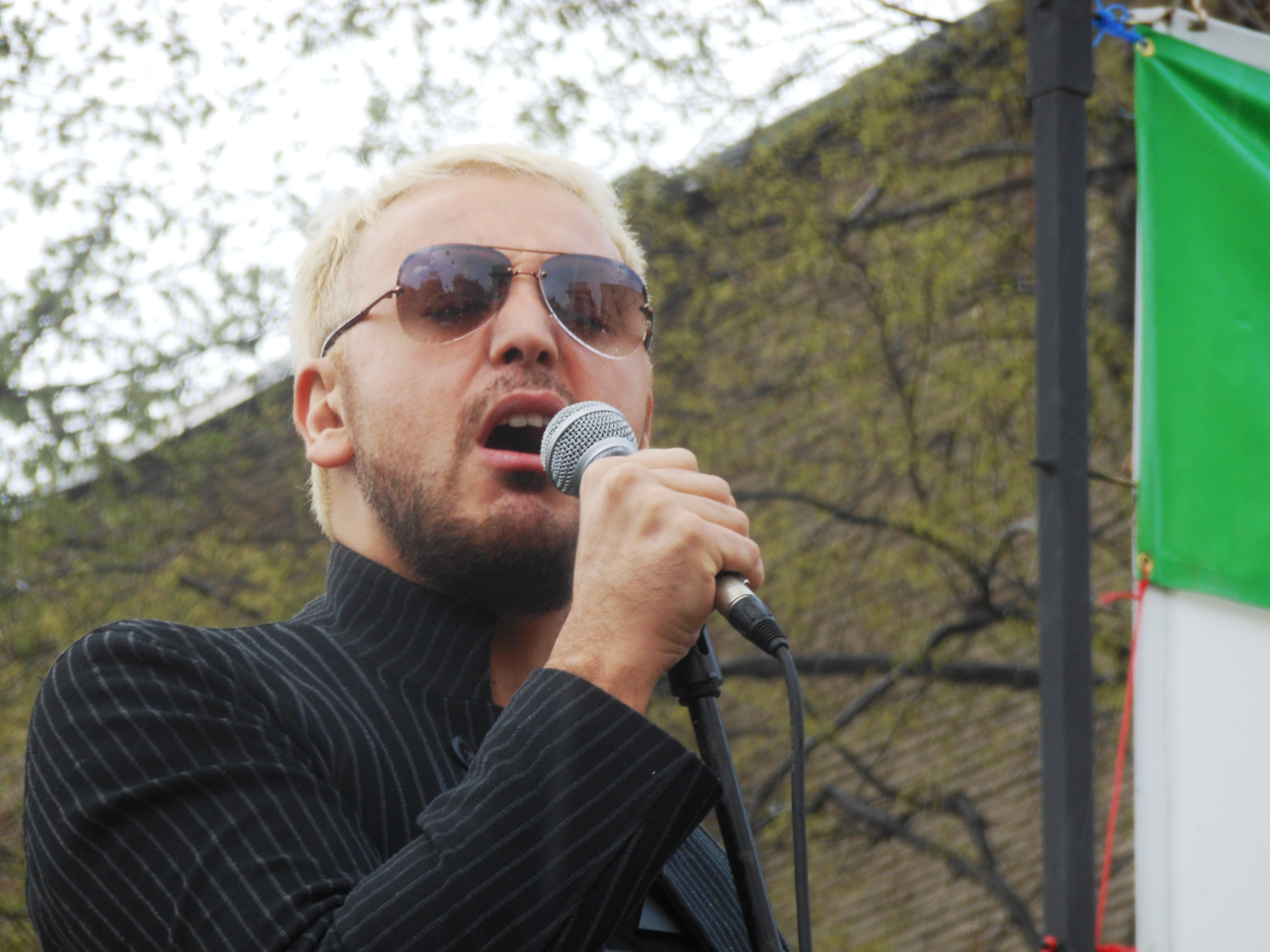 ანრი ჯოხაძე აქციაზე "ჩვენ ერთი სახლი ვართ"